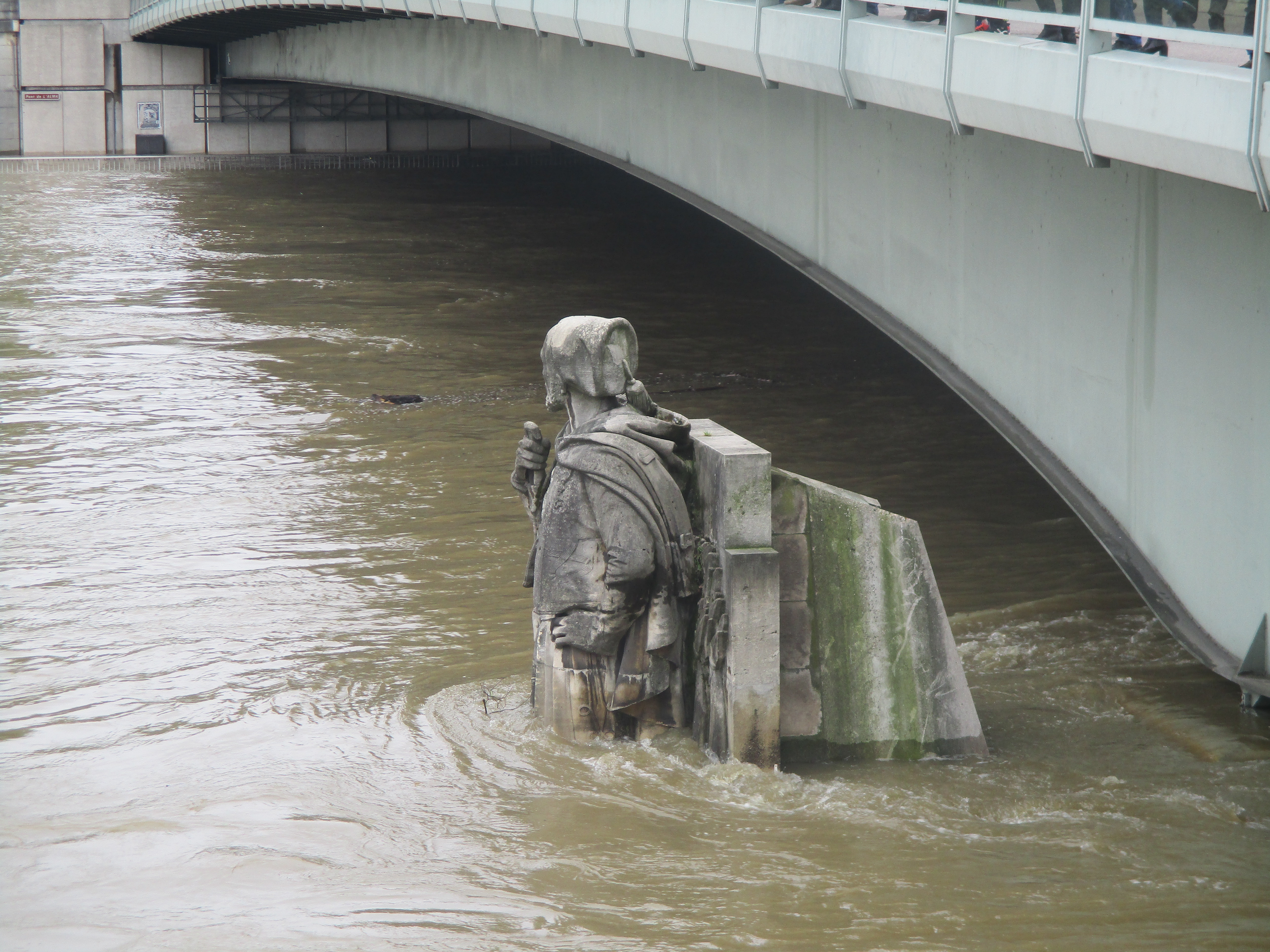 Le Zouave du pont de l'Alma, le 3 juin 2016.